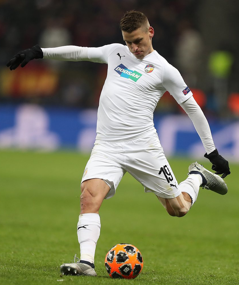 ЦСКА терпит болезненное поражение от «Виктории» и лишается шансов на выход в плей-офф ЛЧ